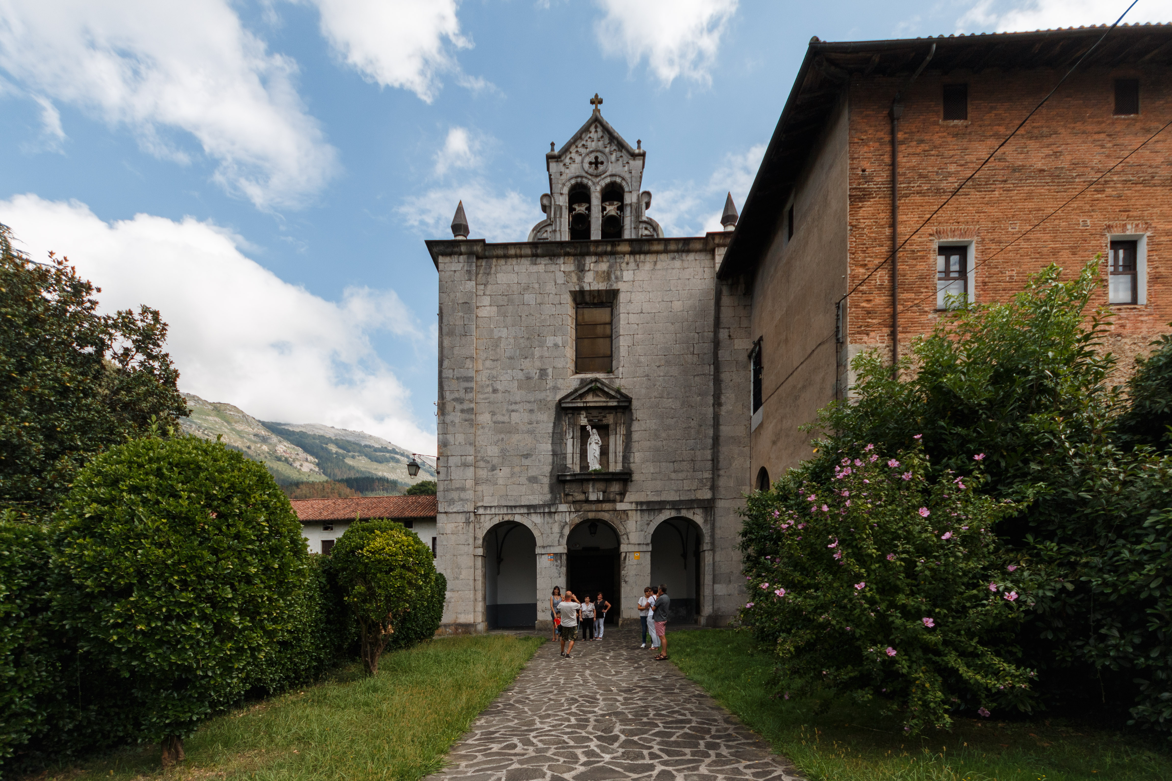 Santa Klara eliza eta komentua